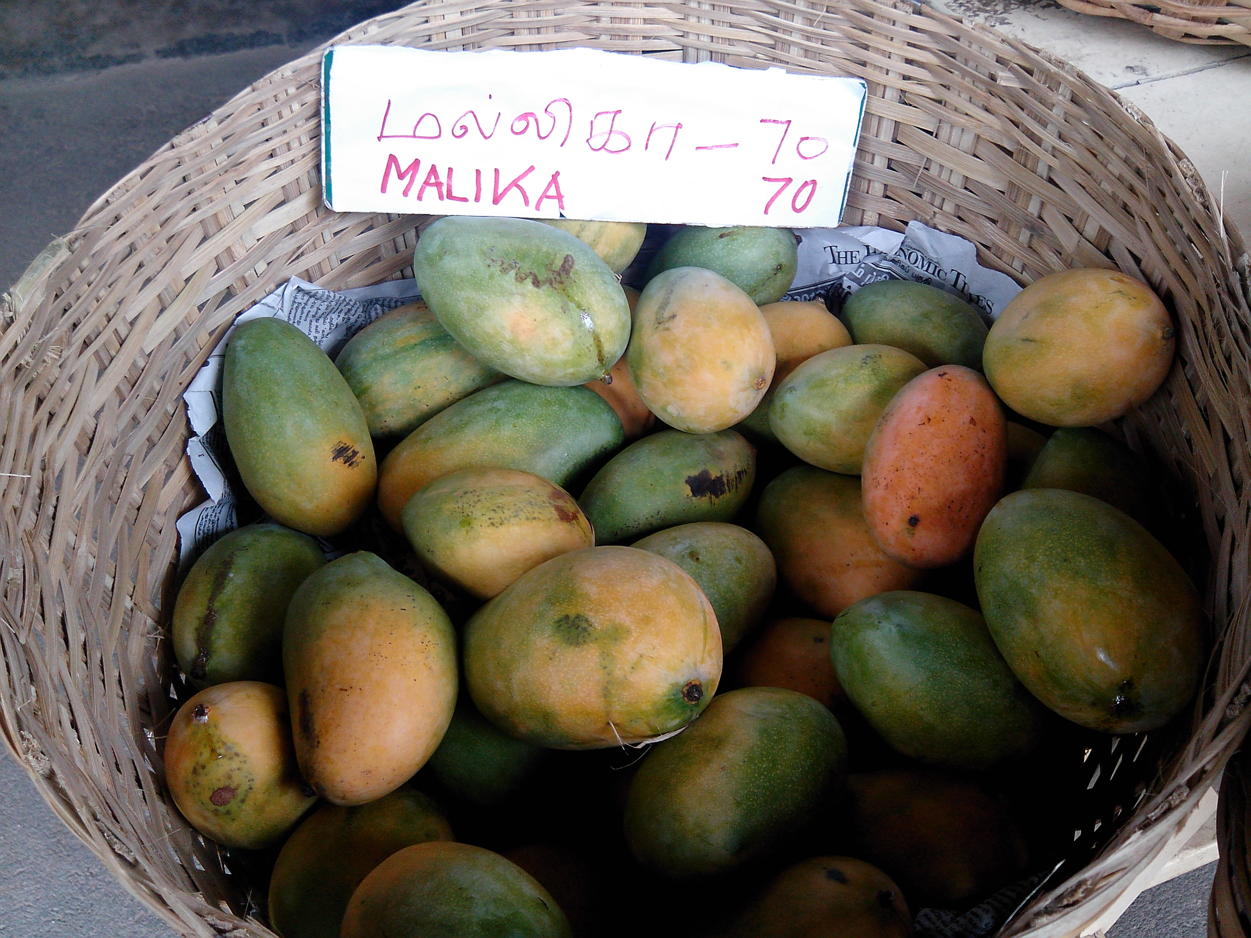 மல்லிகா மாங்கனி, சேலம், தமிழ் நாடு, இந்திய ஒன்றியம்.